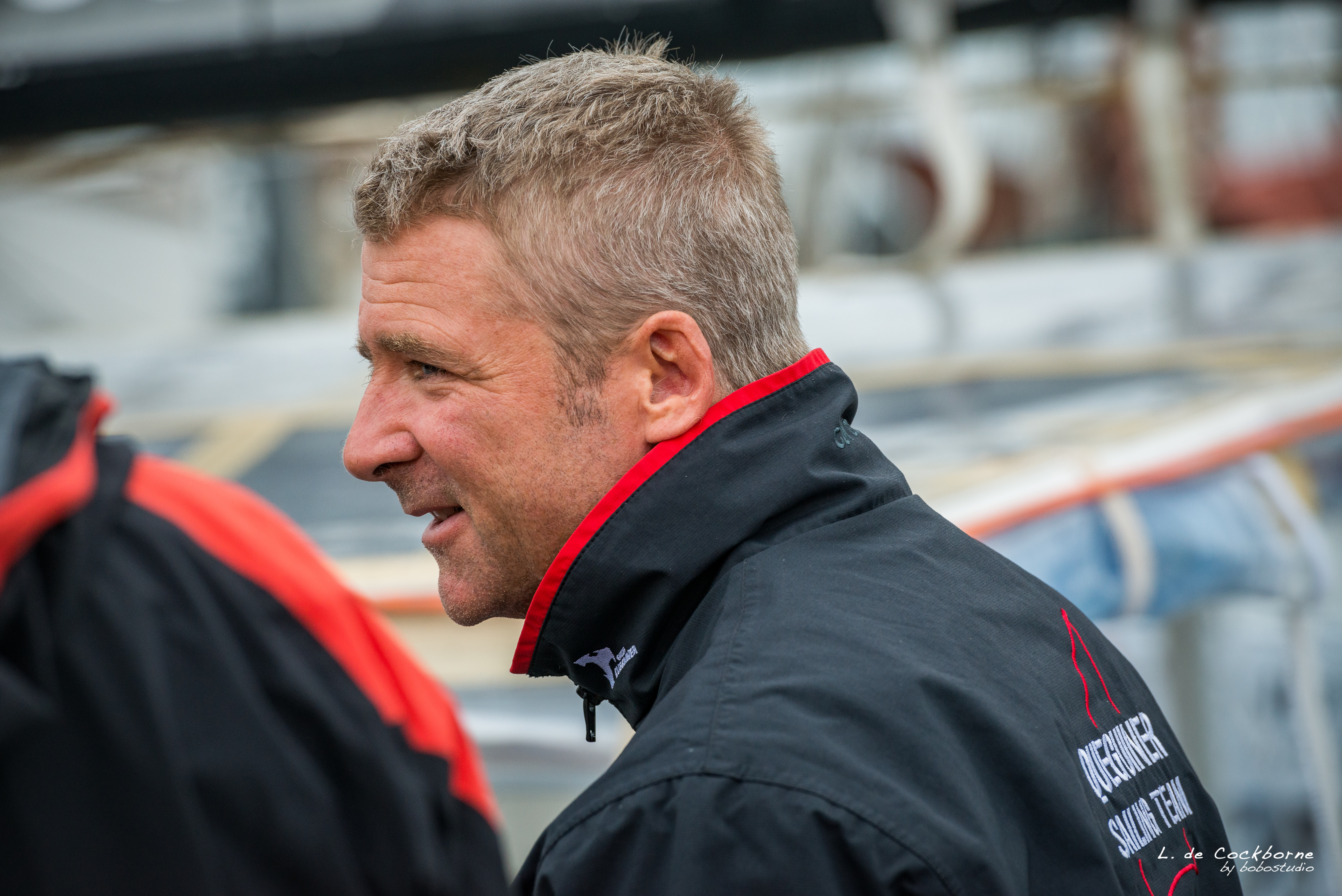 Reportage Vendée Globe 2016